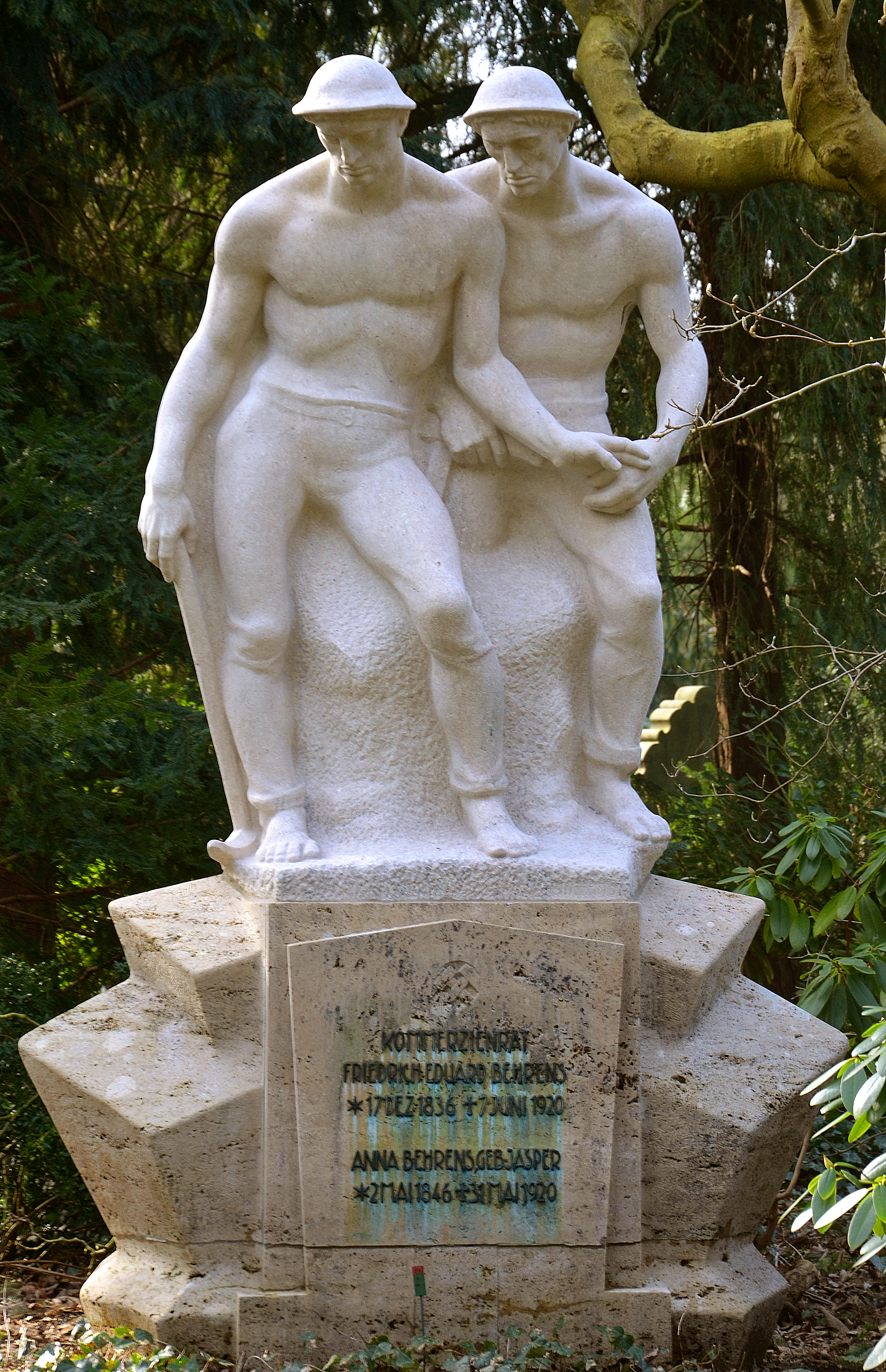 Das von dem Bildhauer Georg Herting geschaffene Grabmal für den Braunkohle-Industriellen, Gründer der nach ihm benannten Stiftung und „Kommerzienrat / Friedrich Eduard Behrens / * 17. Dez. 1836 † 7. Juni 1920“ und seine Ehefrau „Anna Behrens, geb. Jasper / * 2. Mai 1846 † 31. Mai 1920“ auf dem Stadtfriedhof Engesohde ...